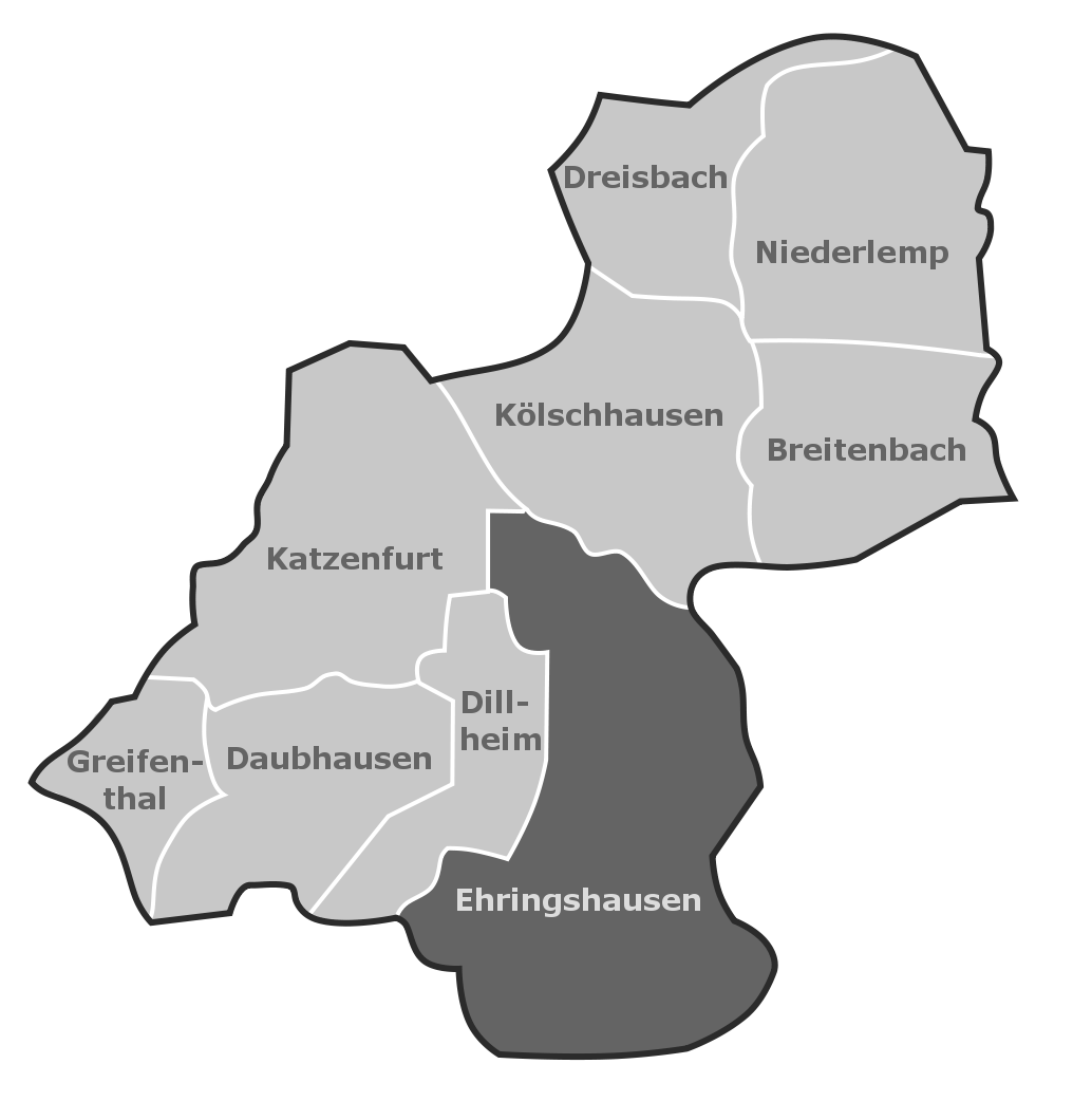 Lage des Hauptorts Ehringshausen in der gesamten Gemeinde